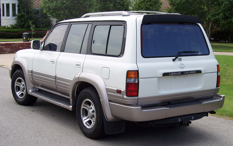 LX450